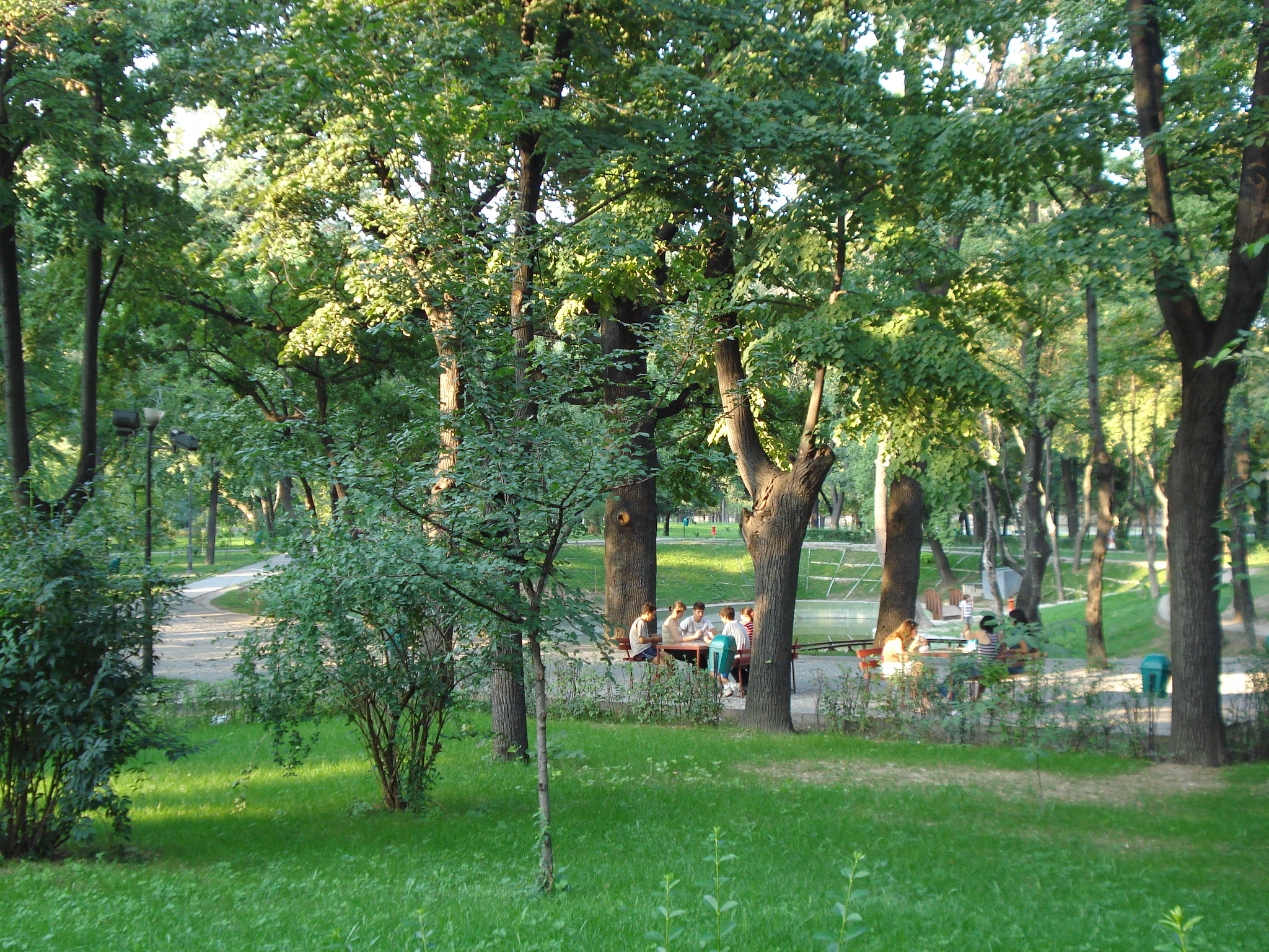 Парк Киселёва, Бухарест, РумынияRomână: Parcul Kiseleff, Bucharest